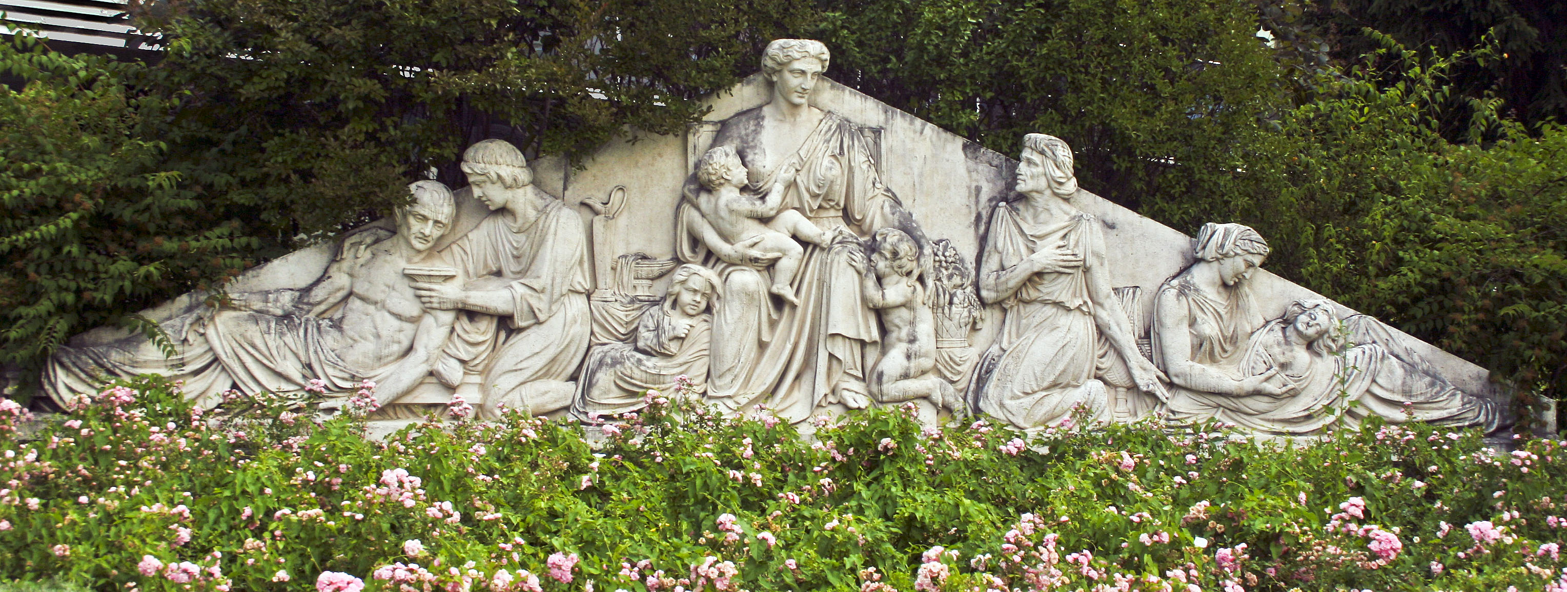 Fronton de l'ancien hôpital civil de Grenoble, par Aimé Charles Irvoy (1825-1898)